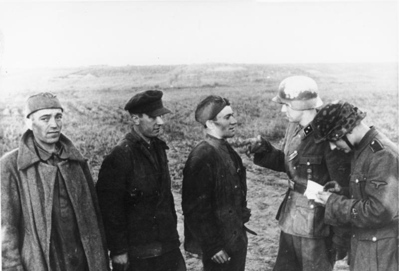 Norwegische Freiwillige im Kampf gegen den Bolschewismus. Ein norwegischer Unterführer verhört bolschwistische Gefangene. 11.8.1942 [Herausgabedatum]